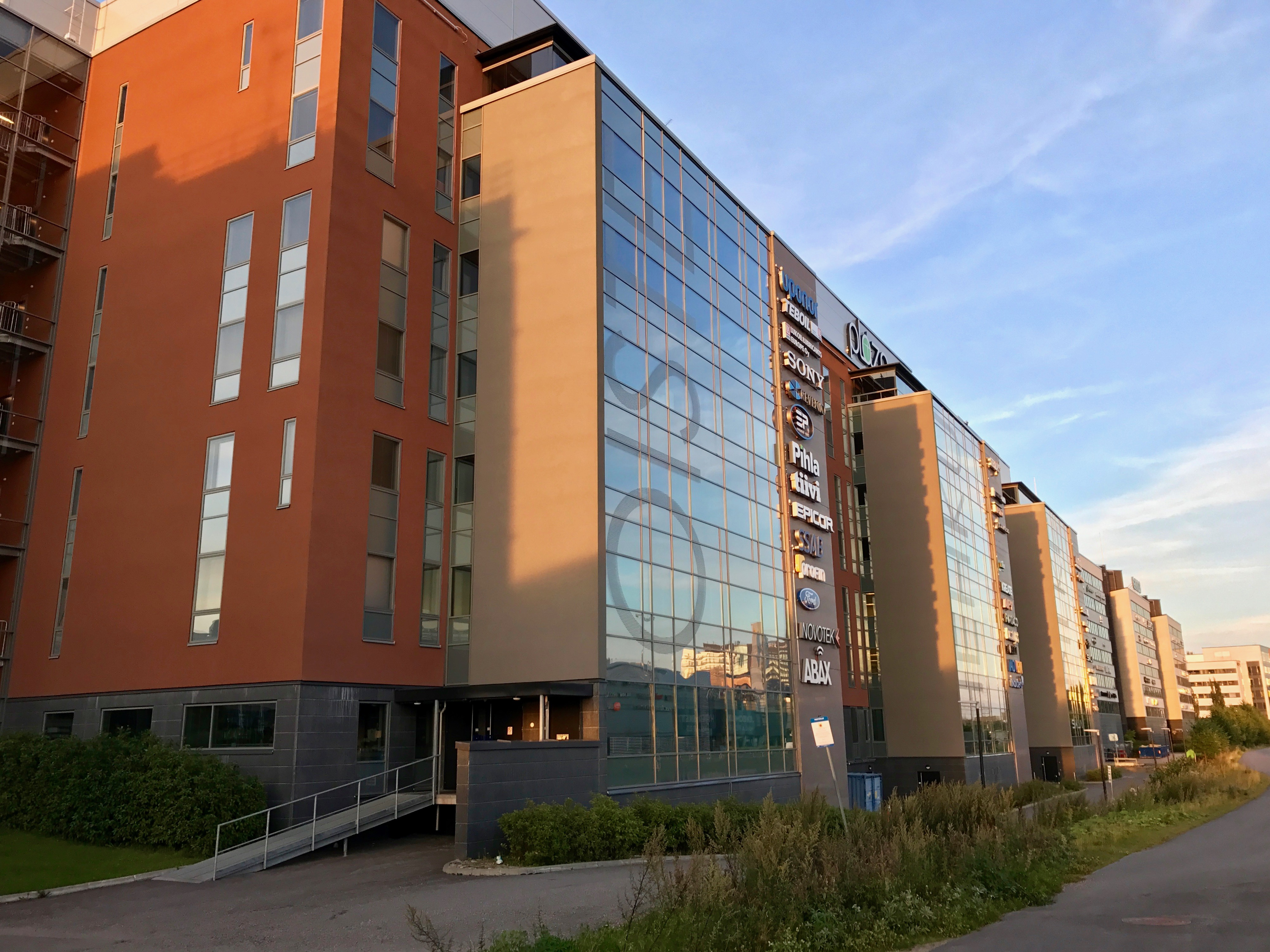 Blaza Business Park toimistorakennus Vantaalla Äyritiellä.